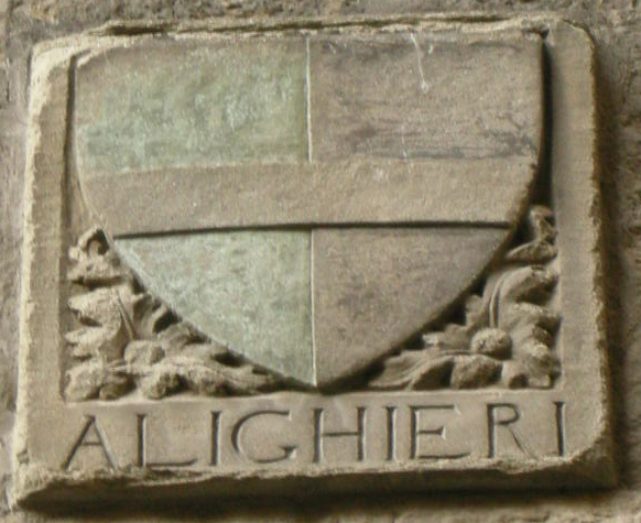 Casa di dante, stemma alighieri 02